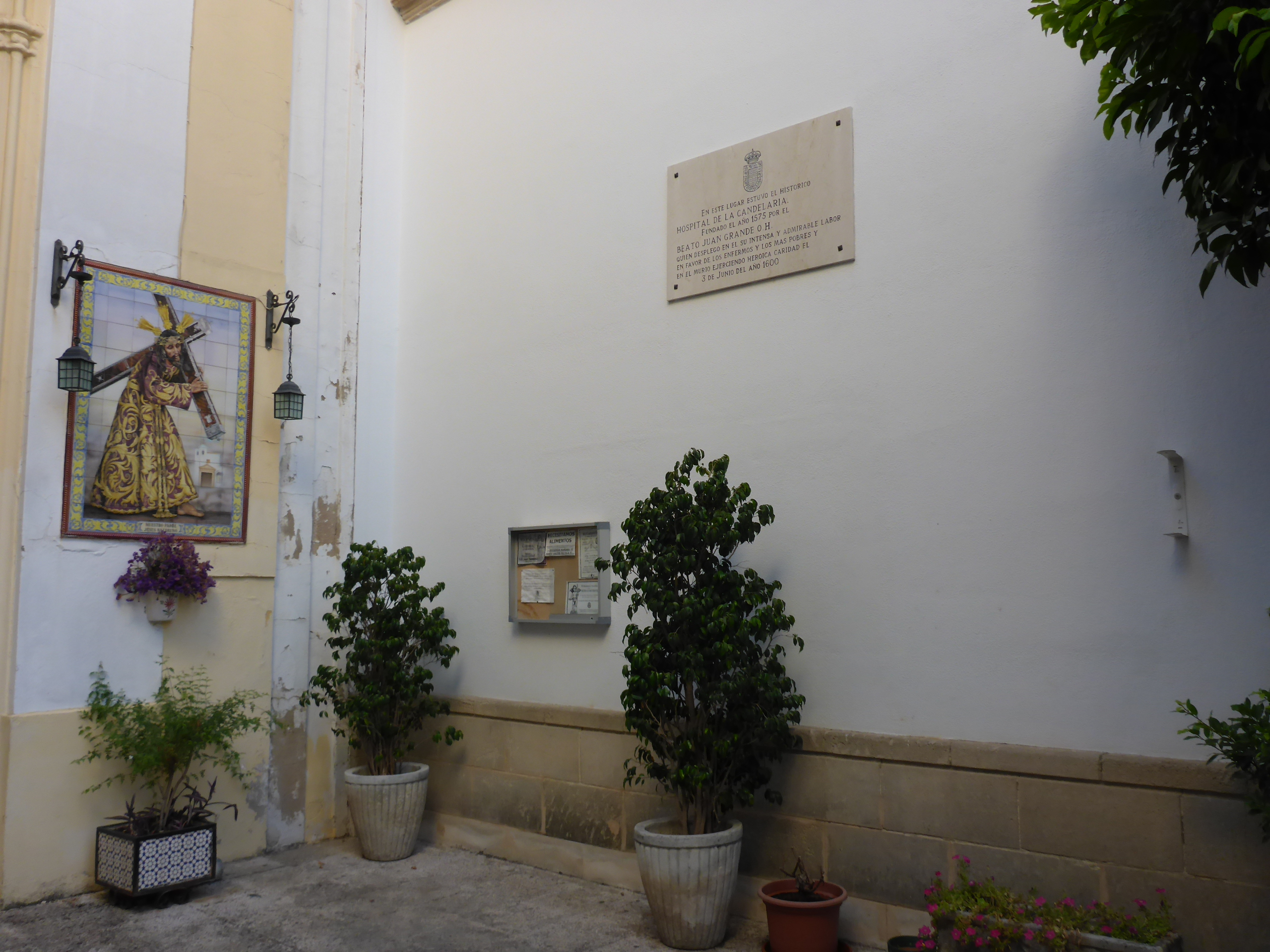 Capilla de San Juan de Letrán (Jerez de la Frontera) con placa y columnad e antiguo hospital de San Juan Grande